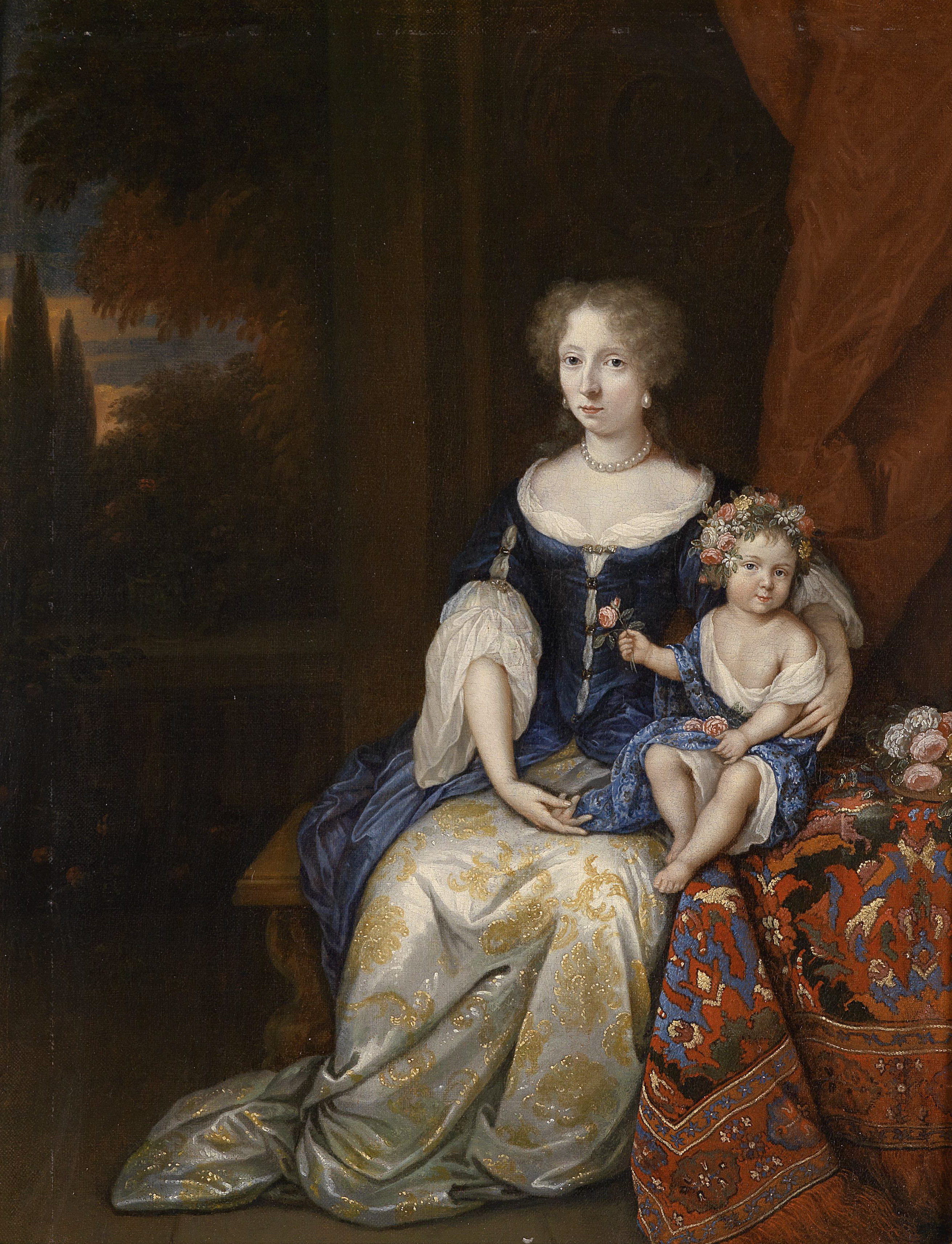 Bildnis einer jungen Dame mit ihrem Kind